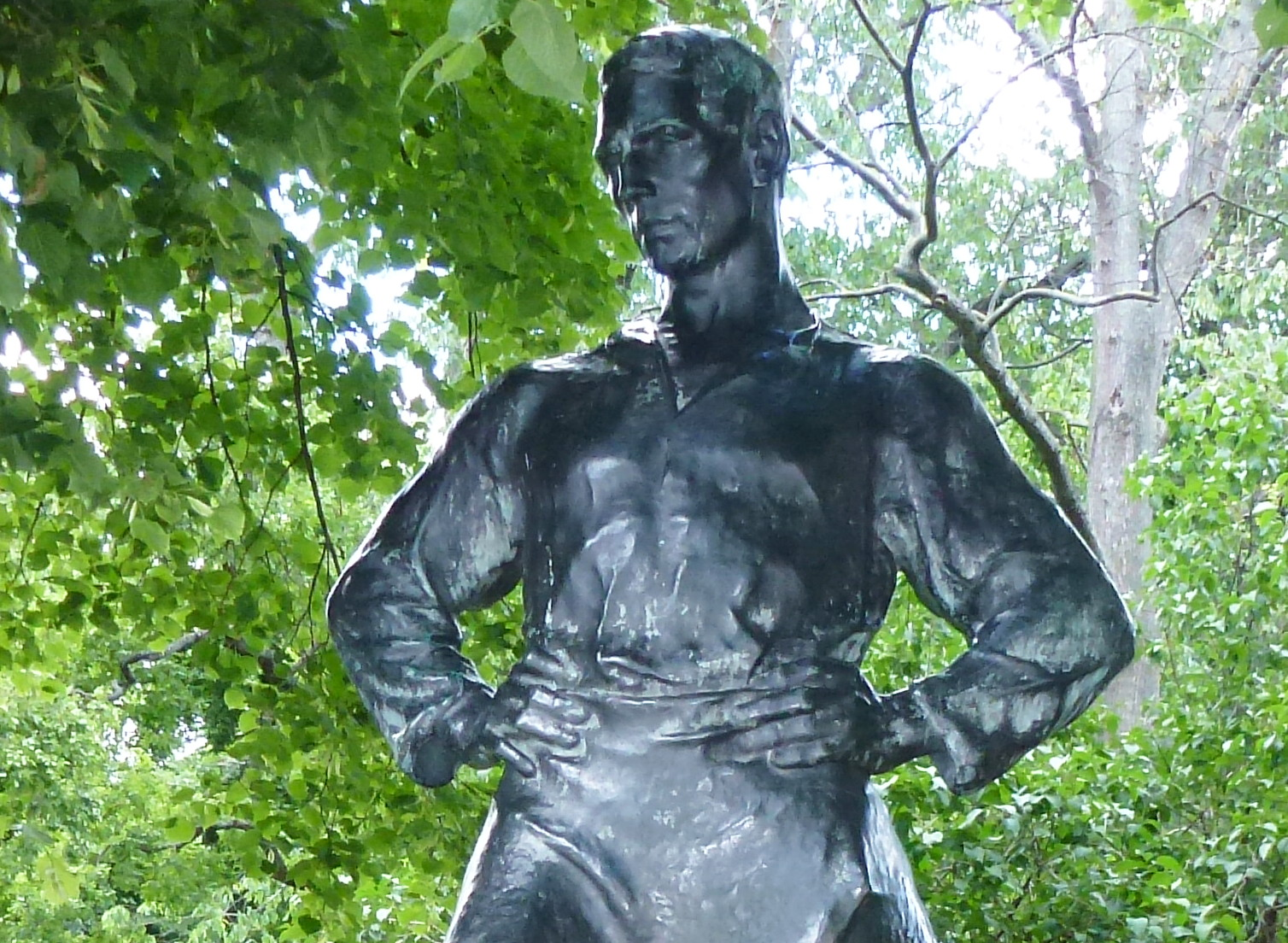 "Arbetaren" (1917), utförd av Gottfrid Larsson (1875-1947). En gåva av Föreningen för Stockholms prydande av konstverk.